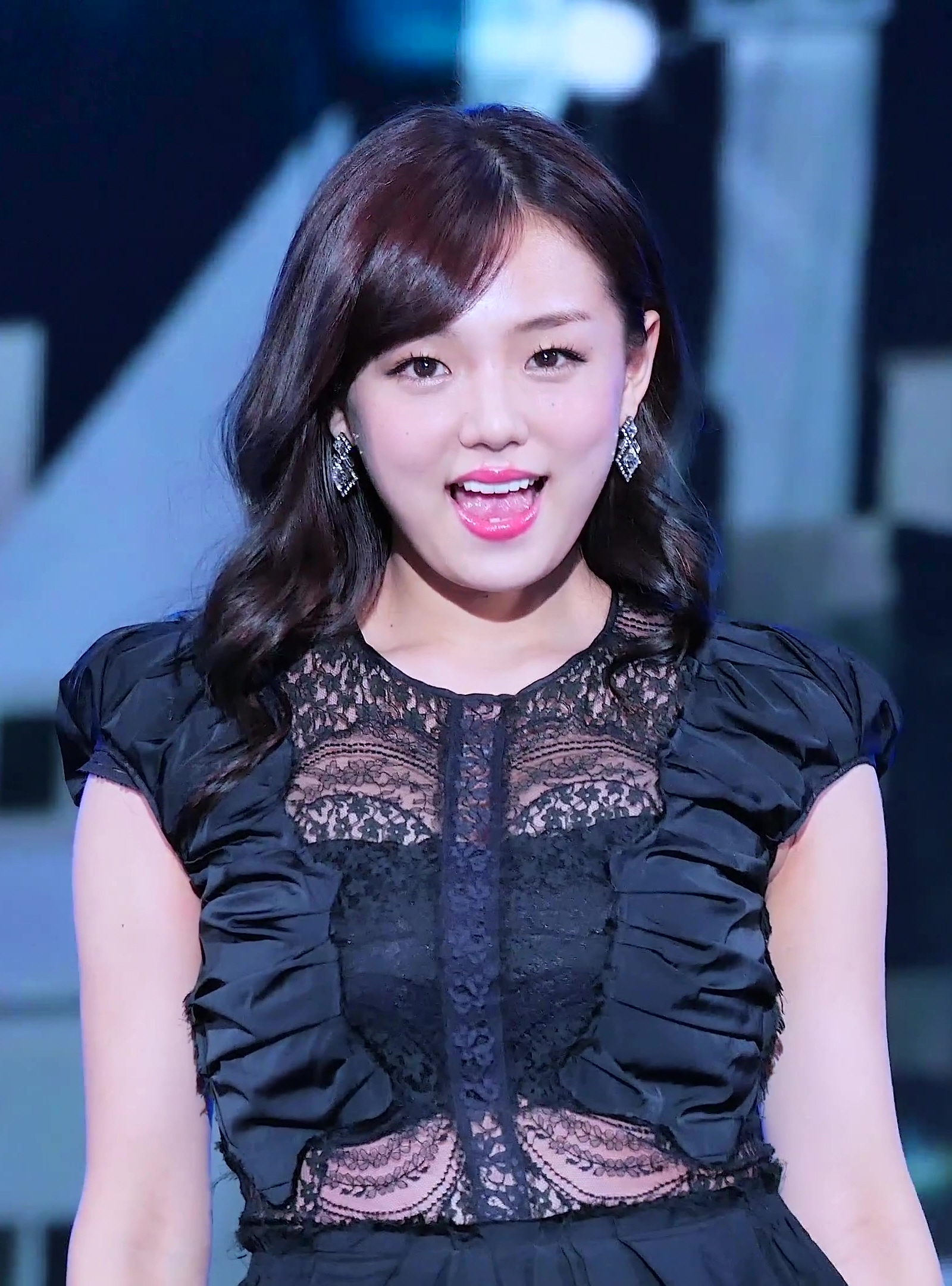 161006 AMN 빅 콘서트 - 시노자키 아이 AGAIN 직캠 by DaftTaengk